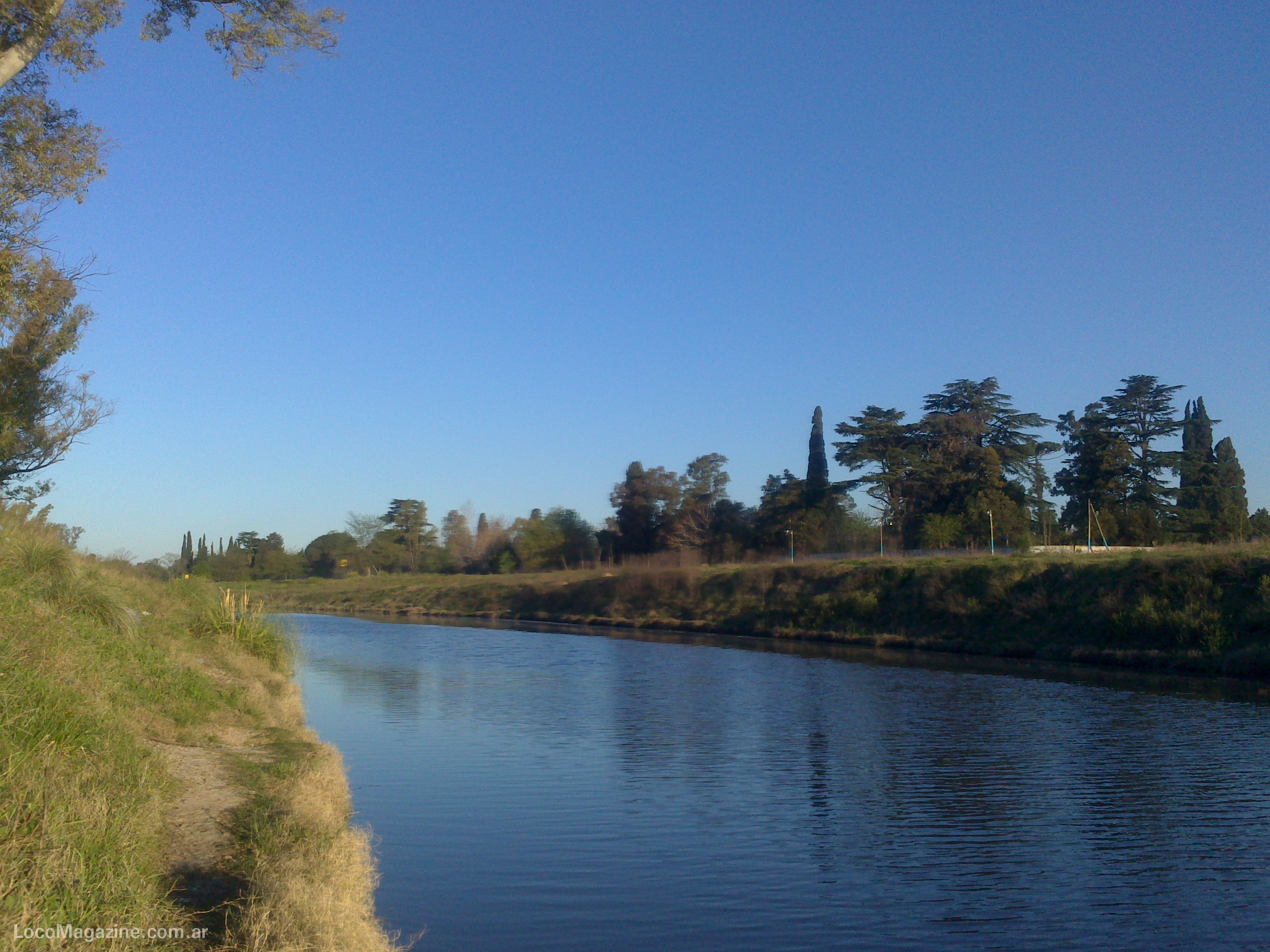 Río Reconquista, Moreno